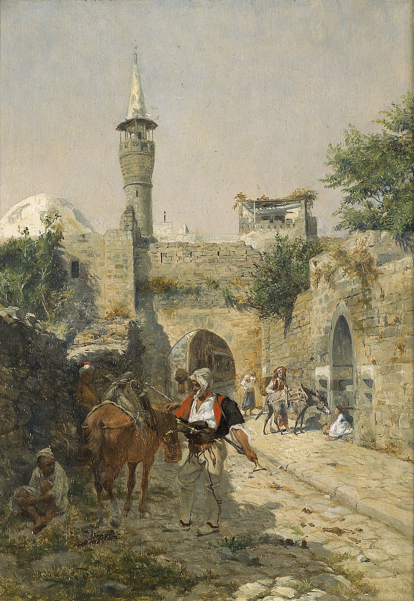 Straßenszene in Jerusalemtitle QS:P1476,de:"Straßenszene in Jerusalem" label QS:Lde,"Straßenszene in Jerusalem" (?)